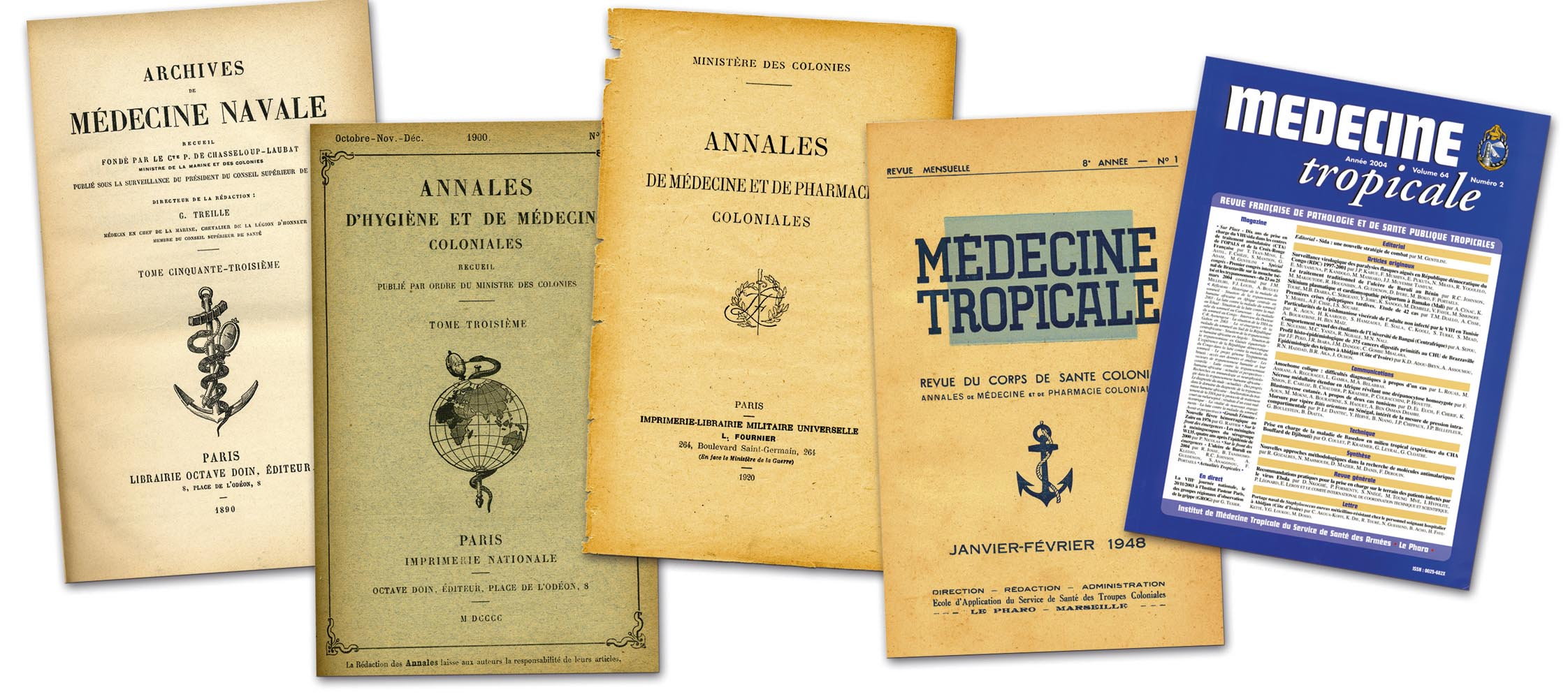 Les différents titres et couvertures de la revue éditée par l'Ecole du Pharo au cours du temps